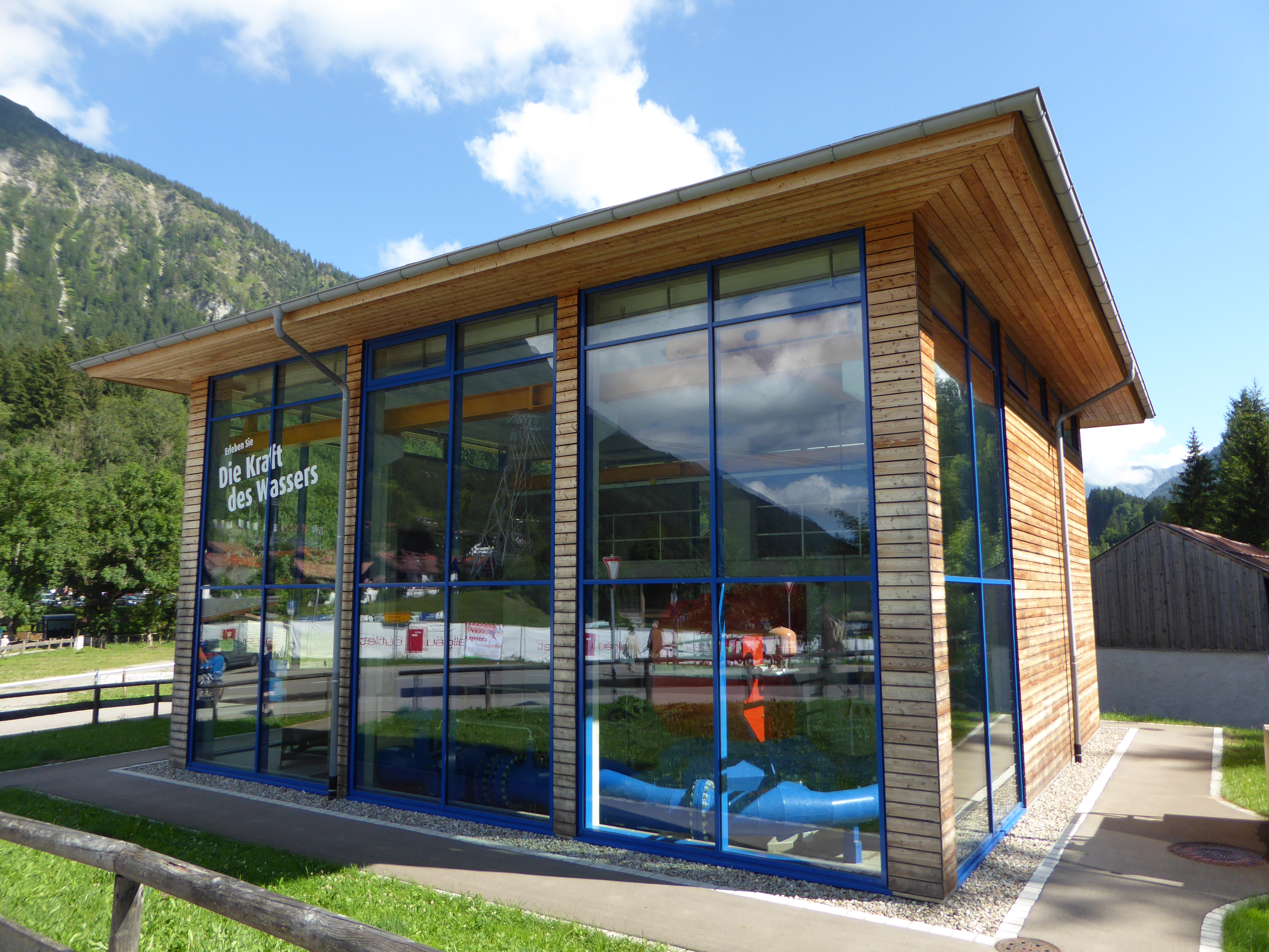 Krafthaus (Turbinenhaus) des 2011 fertig gestellte Wasserkraftwerkes Faltenbach - Leistung 1.600kW - Jahresarbeit 4 Mio. kWh